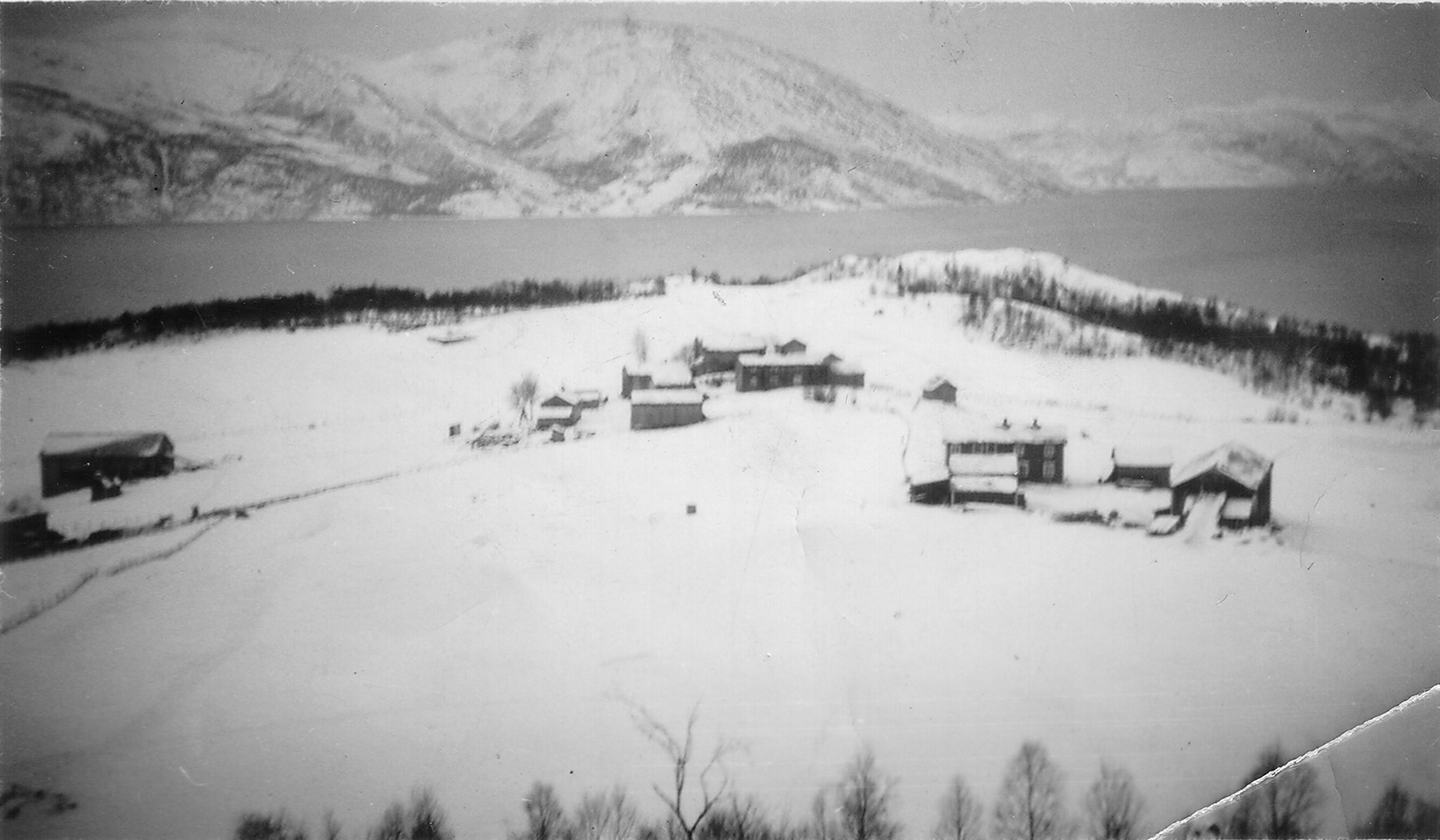 Lindset 1946